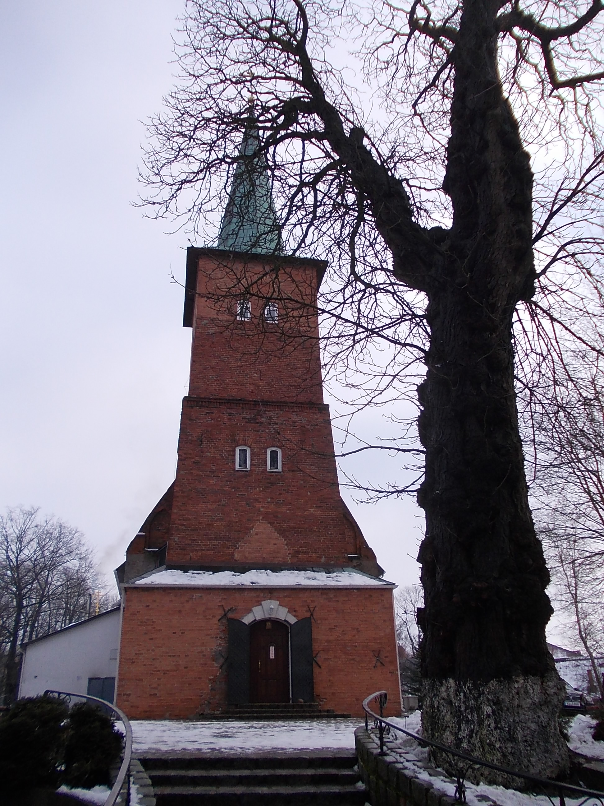 Башня звонницы Свято-никольского собора в Калининграде (бывшей Юдиттен-кирхи Кёнигсберга)